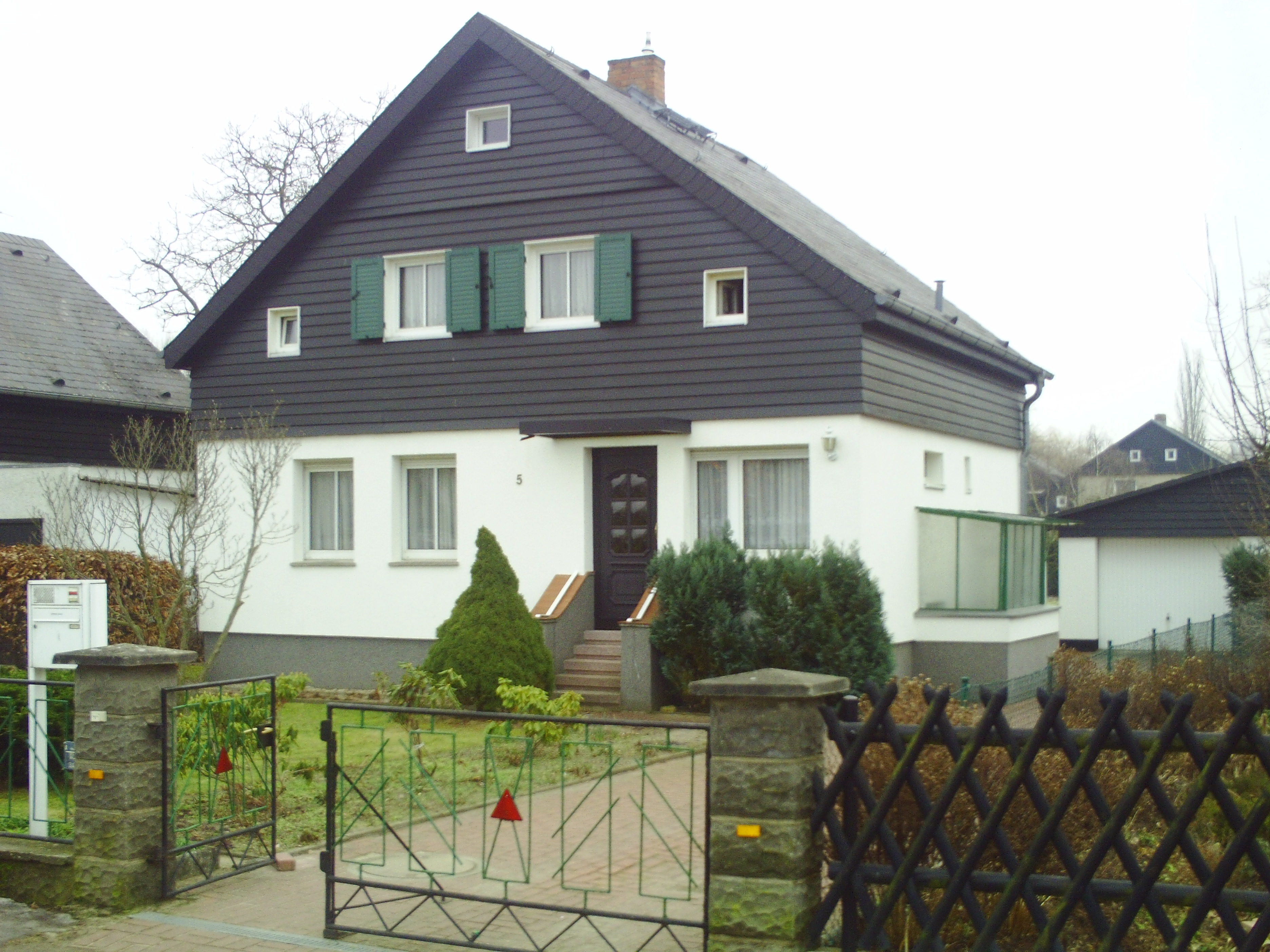 Wohnhaus der Stadtrandsiedlung in Potsdam-Waldstadt I. „“